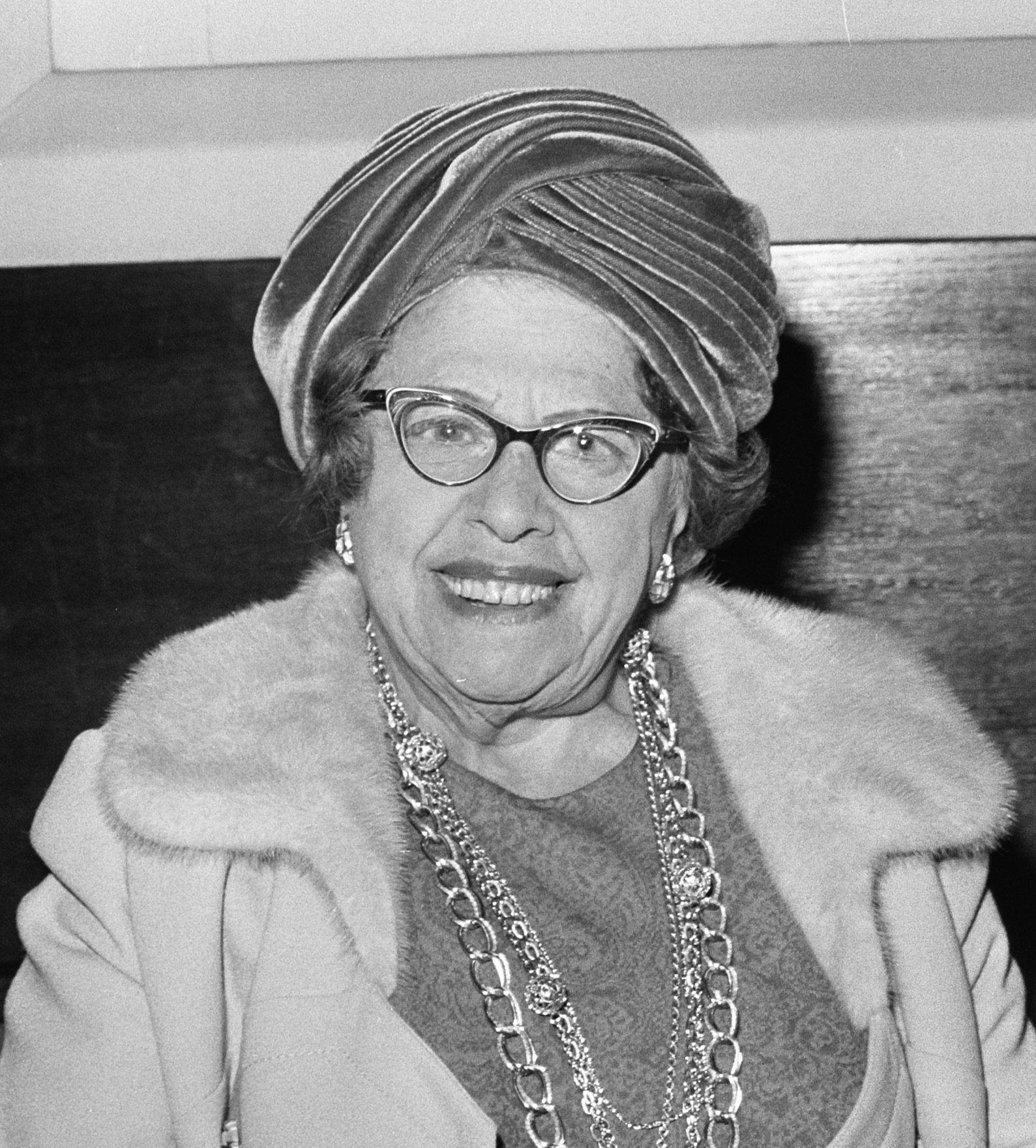 Collectie / Archief : Fotocollectie Anefo Reportage / Serie : [ onbekend ] Beschrijving : Actie Bisschop Bekkers nr. 13a : Heintje Davids Datum : 9 mei 1969 Trefwoorden : collectanten Persoonsnaam : Bekkers, Heintje Davids Fotograaf : Mieremet, Rob / Anefo Auteursrechthebbende : Nationaal Archief Materiaalsoort : Negatief (zwart/wit) Nummer archiefinventaris : bekijk toegang 2.24.01.05 Bestanddeelnummer : 922-3986